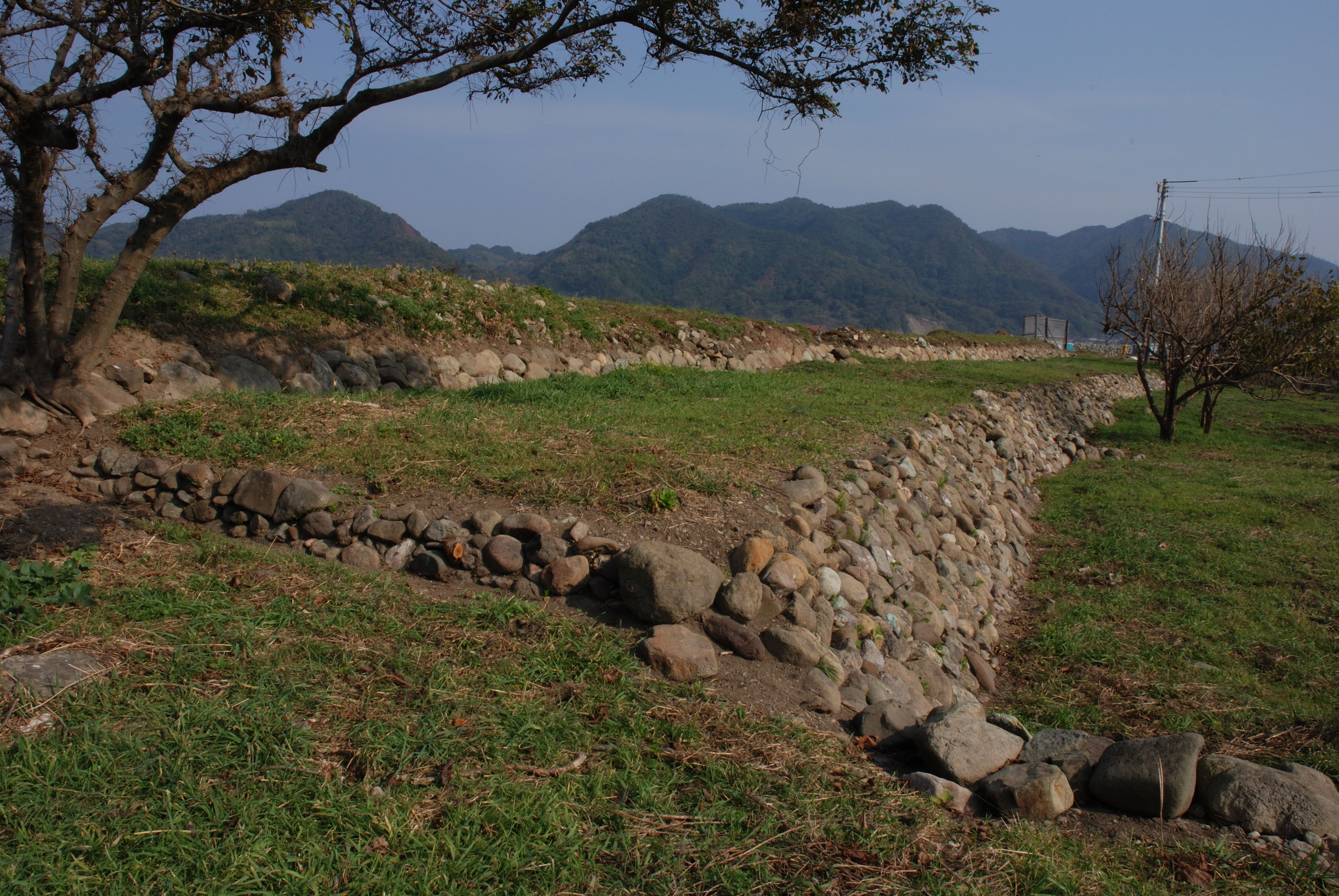 Kawashimo Daiba